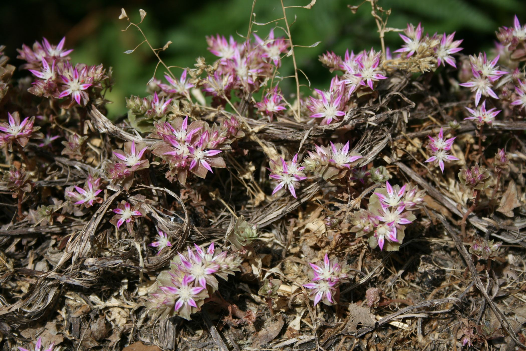 Phedimus stellatus (= Sedum stellatum), Dickblattgewächse (Crassulaceae) - Italien/Italia/Italy: Kalabrien/Calabria, Prov. Reggio Calabria, Aspromonte, bei San Peri, SSE Scilla